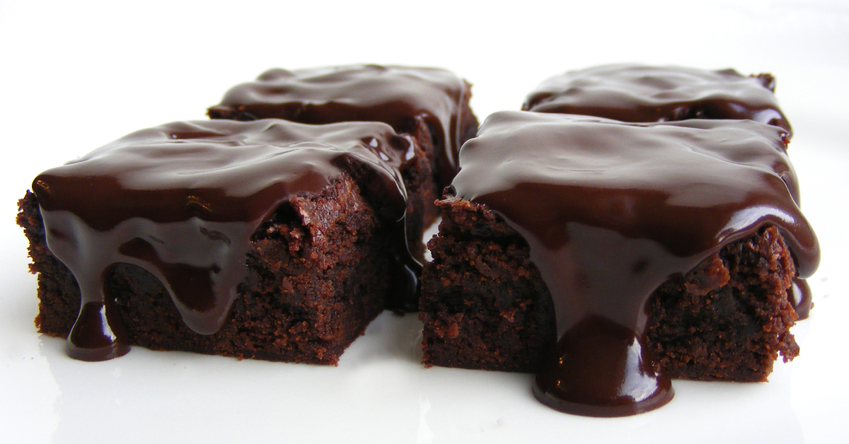 Brownies with chocolate glaze.